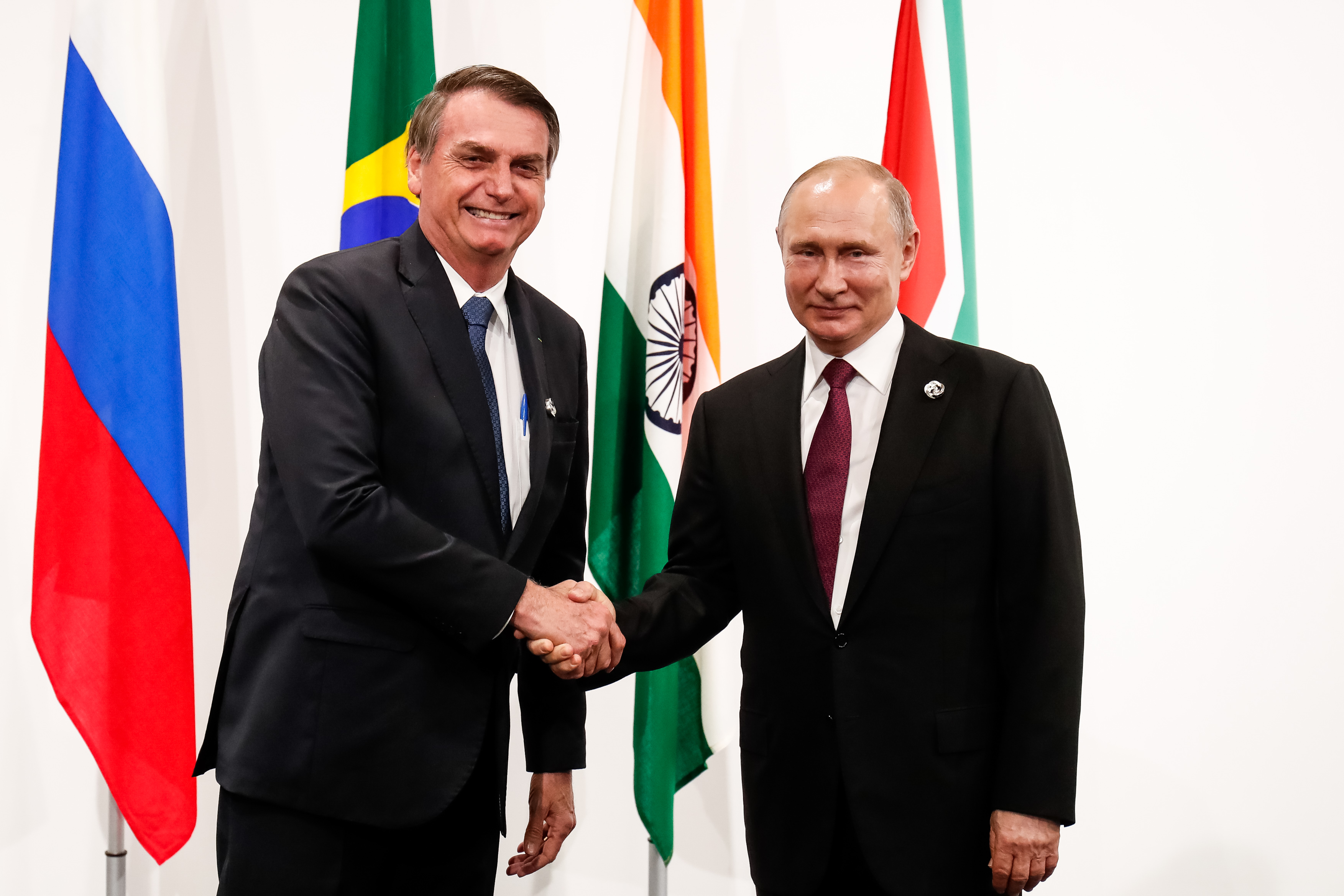 (Osaka - Japão, 28/06/2019) Presidente da República, Jair Bolsonaro, durante recepção ao Presidente da Federação Russa, senhor Vladimir Putin.Foto: Alan Santos / PR